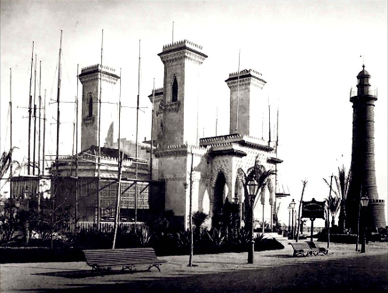 Pabellón de la Compañía Trasatlántica (1888).